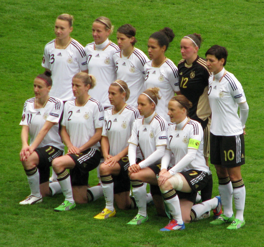 Deutsche Nationalmannschaft. V.l.n.r. obere Reihe: Josephine Henning, Viola Odebrecht, Annike Krahn, Célia Okoyino da Mbabi, Almuth Schult, Linda Bresonik, untere Reihe: Anja Mittag, Bianca Schmidt, Lena Goeßling, Babett Peter, Melanie Behringer.